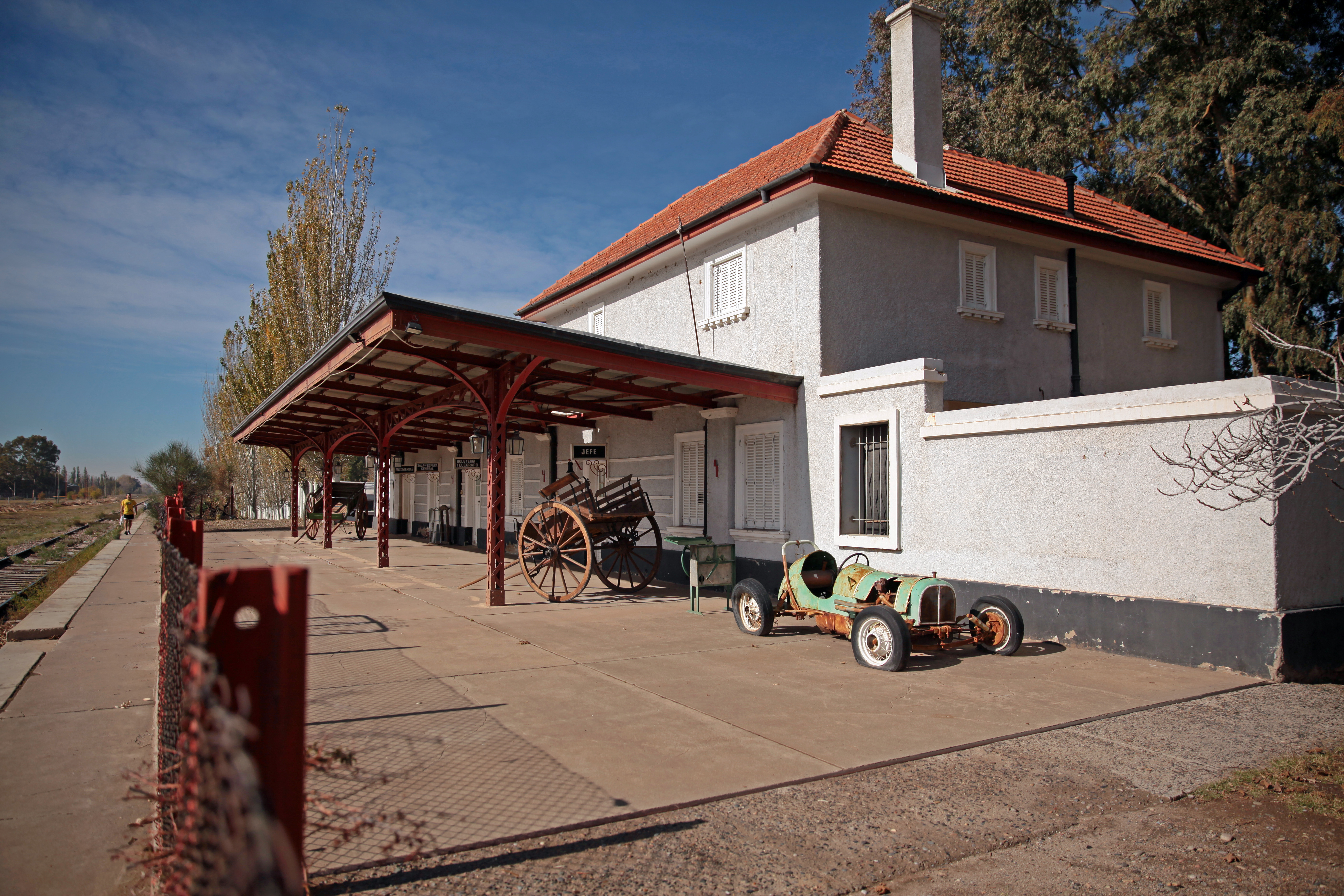 estacion tren - fernandez oro